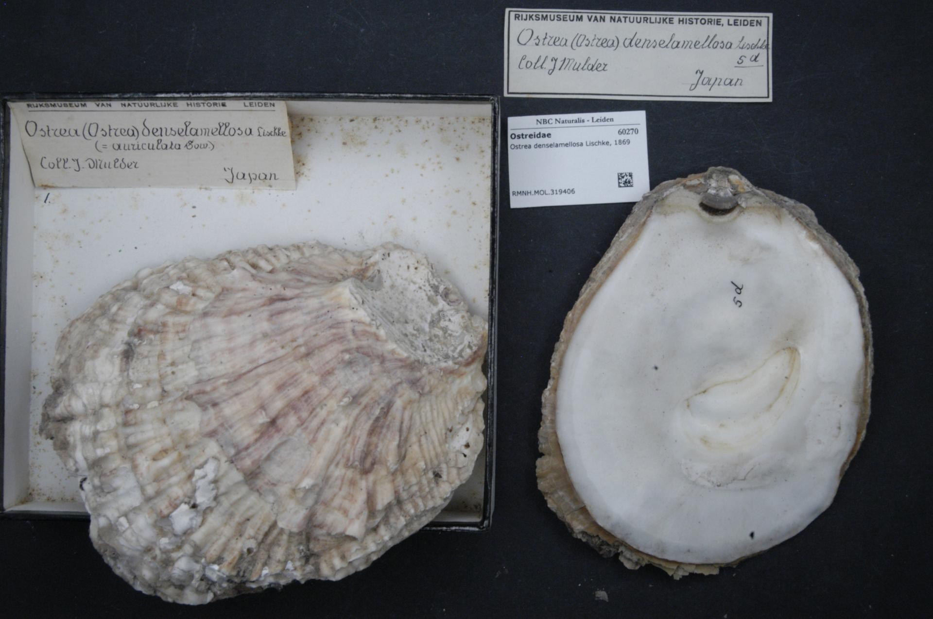 Ostrea denselamellosa Lischke, 1869